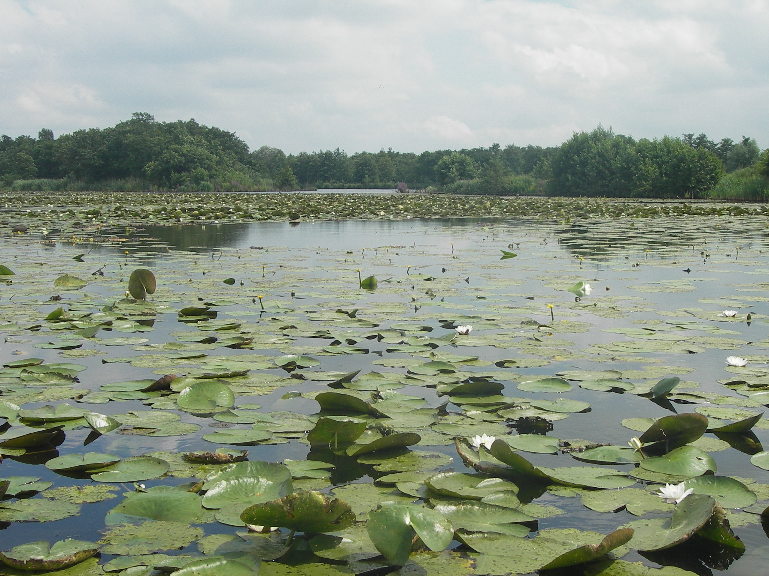 Plas met waterlelies bij Kortenhoef